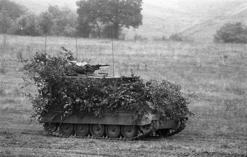 23.9.1986 Mitarbeiter des Bundespresseamtes beobachten das Herbstmanöver "Fränkischer Schild" der Bundeswehr- mit Beteiligung zahlreicher Soldaten aus NATO-Mitgliederstaaten sowie eines französichen Großverbandes - im Raum Würzburg.